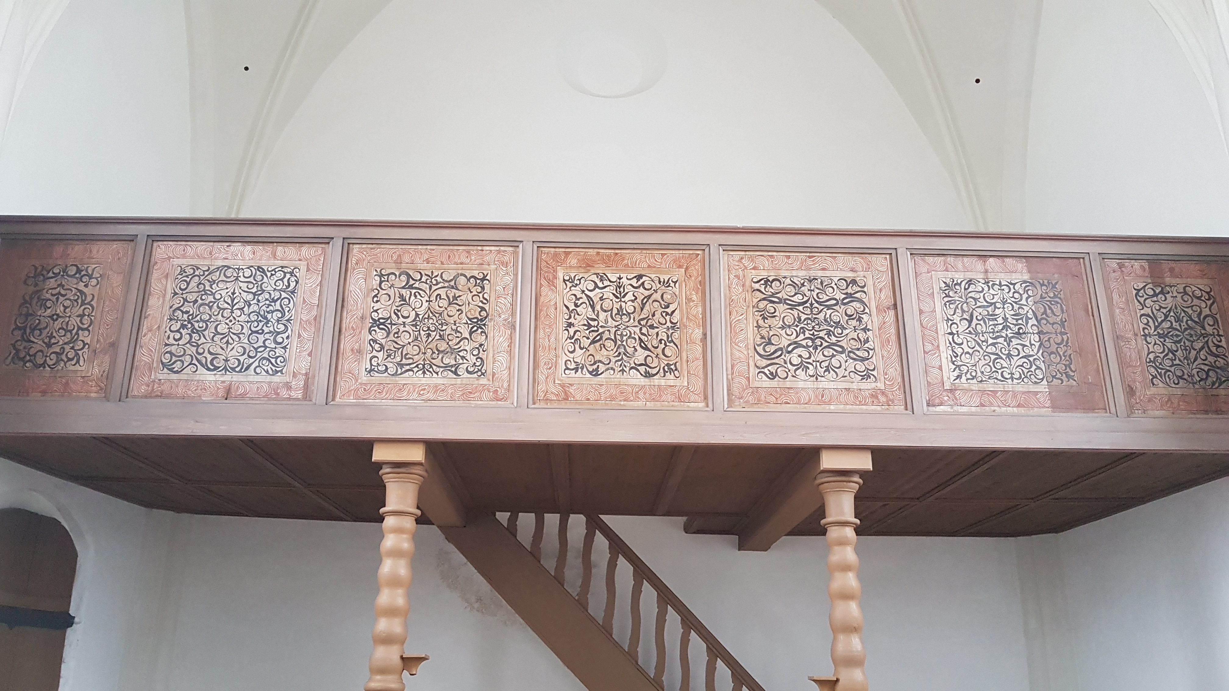 Mühldorf (Petershausen), Wallfahrtskirche St. Ulrich, Renaissance-Empore (Brüstung sind als rot-blaues Schablonenmuster Rankenwerk und Spiralmuster, die wie Intarsienarbeiten wirken, aus dem späten 16. Jahrhundert aufgemalt).